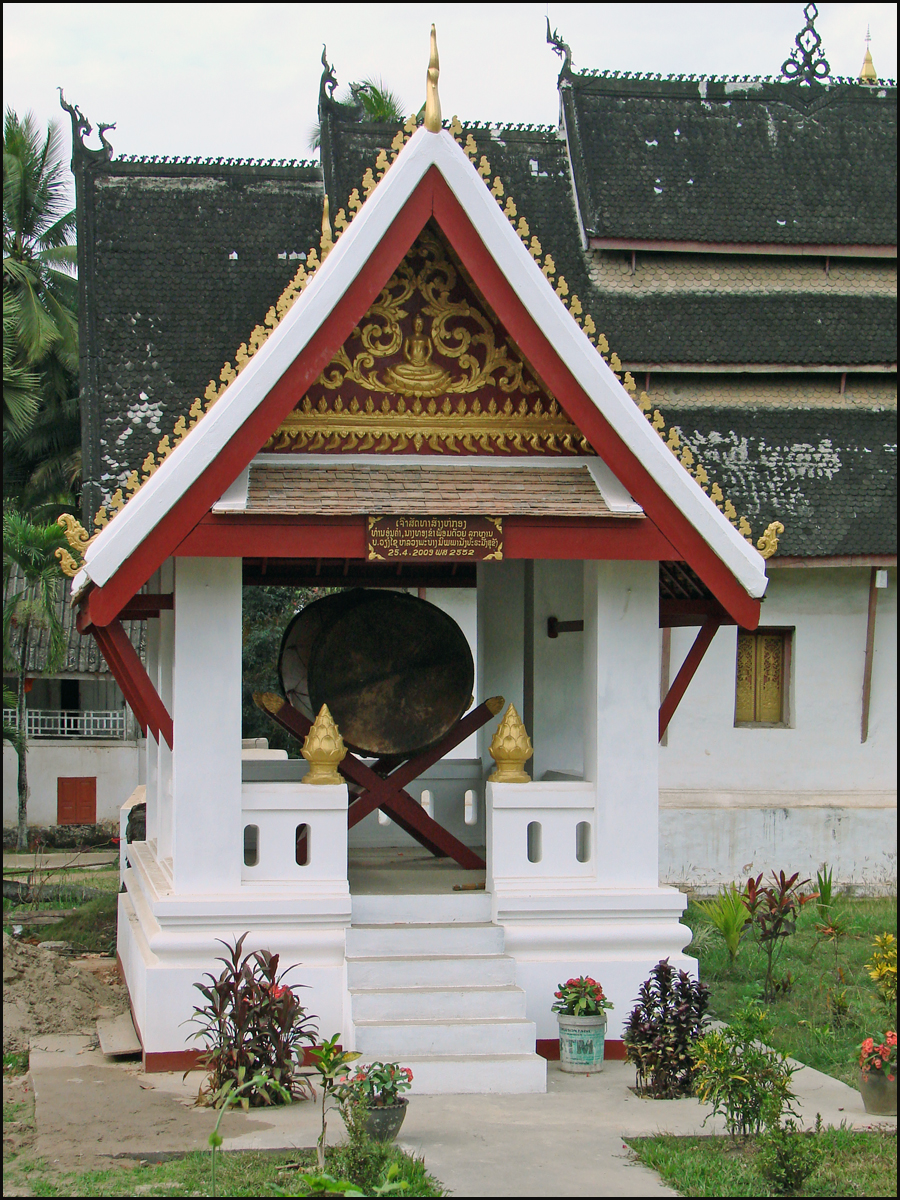 L'abri du tambour du Vat Vixun. Le Vat Vixun d'origine, construit en bois, a été détruit en 1887 par les Ho, appelés les pavillons noirs, lors du siège de la ville. Il a été reconstruit en maçonnerie en 1898 sous le règne de Sakkarine. Le Phra Bang a été conservé dans le vat Vixun jusqu'en 1560. C'est une des pagodes historiques les plus importantes de la ville.